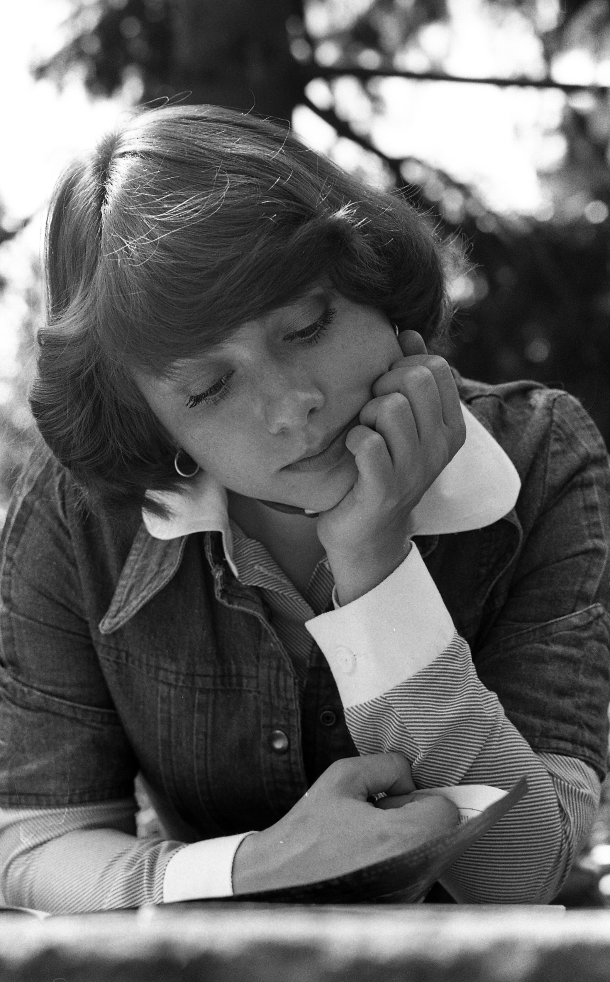 Katona Klári énekesnő. Location: Hungary Title: Katona Klári énekesnő.